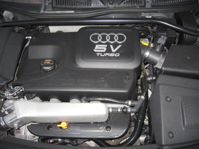 Двигун Audi TT 8N